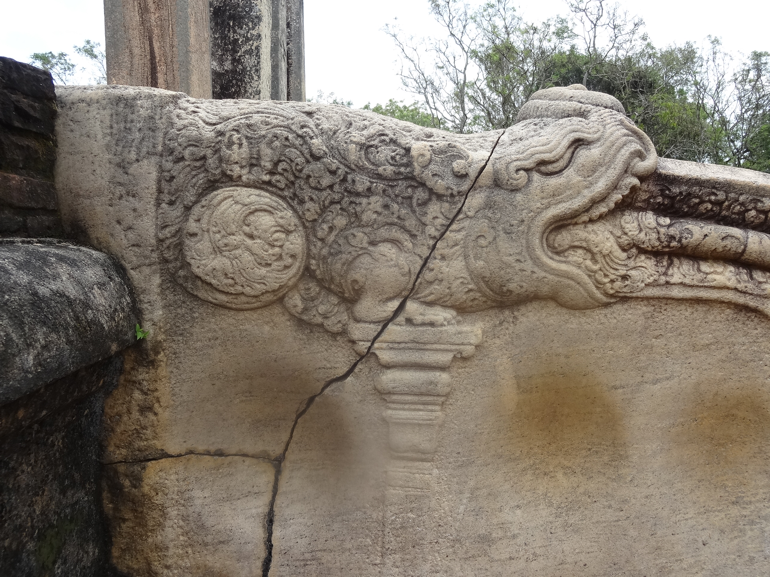 Chapter house, Anuradhapura